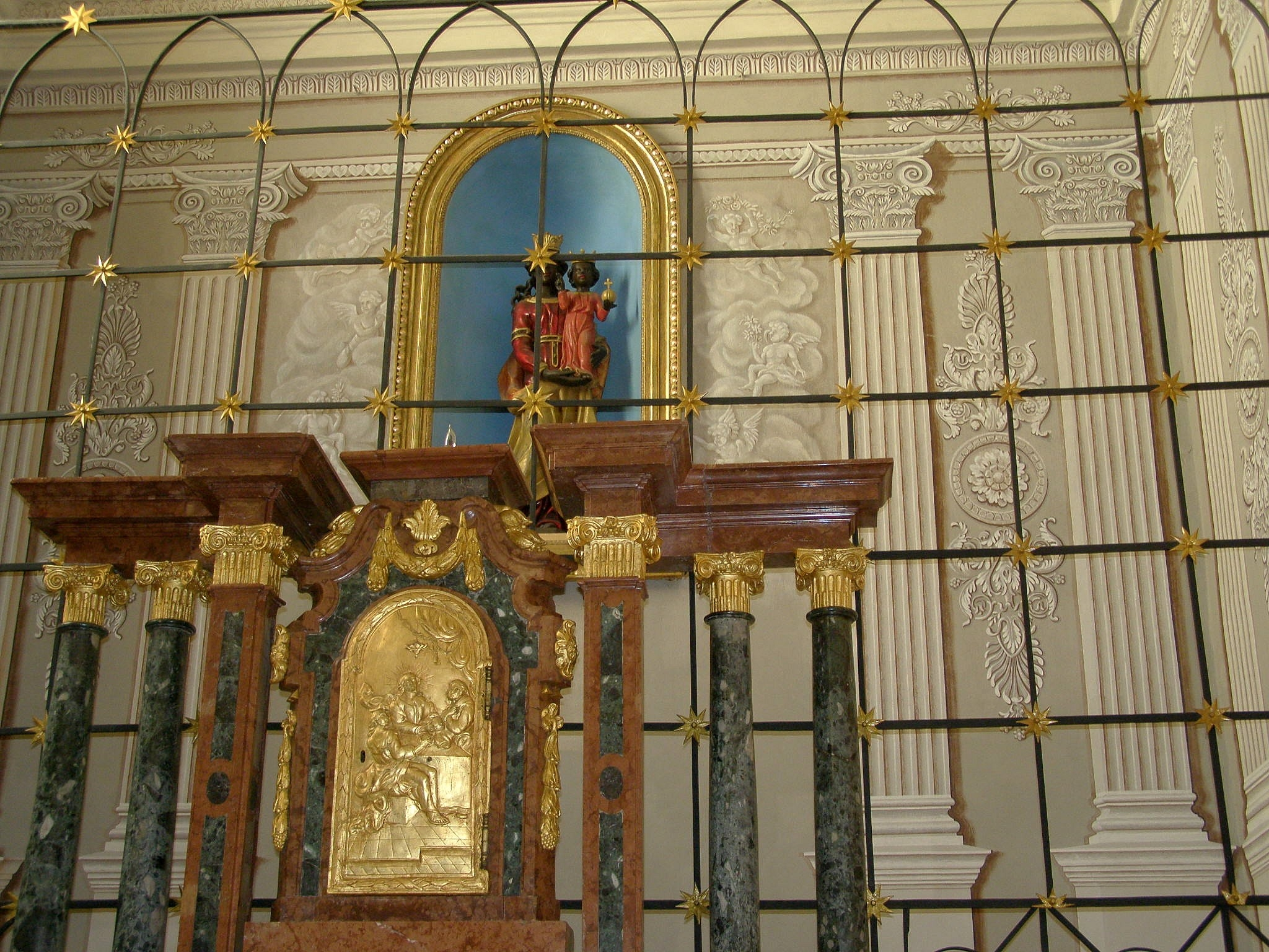 Socha Čiernej Madony. Interiér kaplnky, zvanej aj Loretánska, je napodobnením domčeka Panny Márie v Nazarete. Kaplnku pristavali ku kostolu v roku 1700